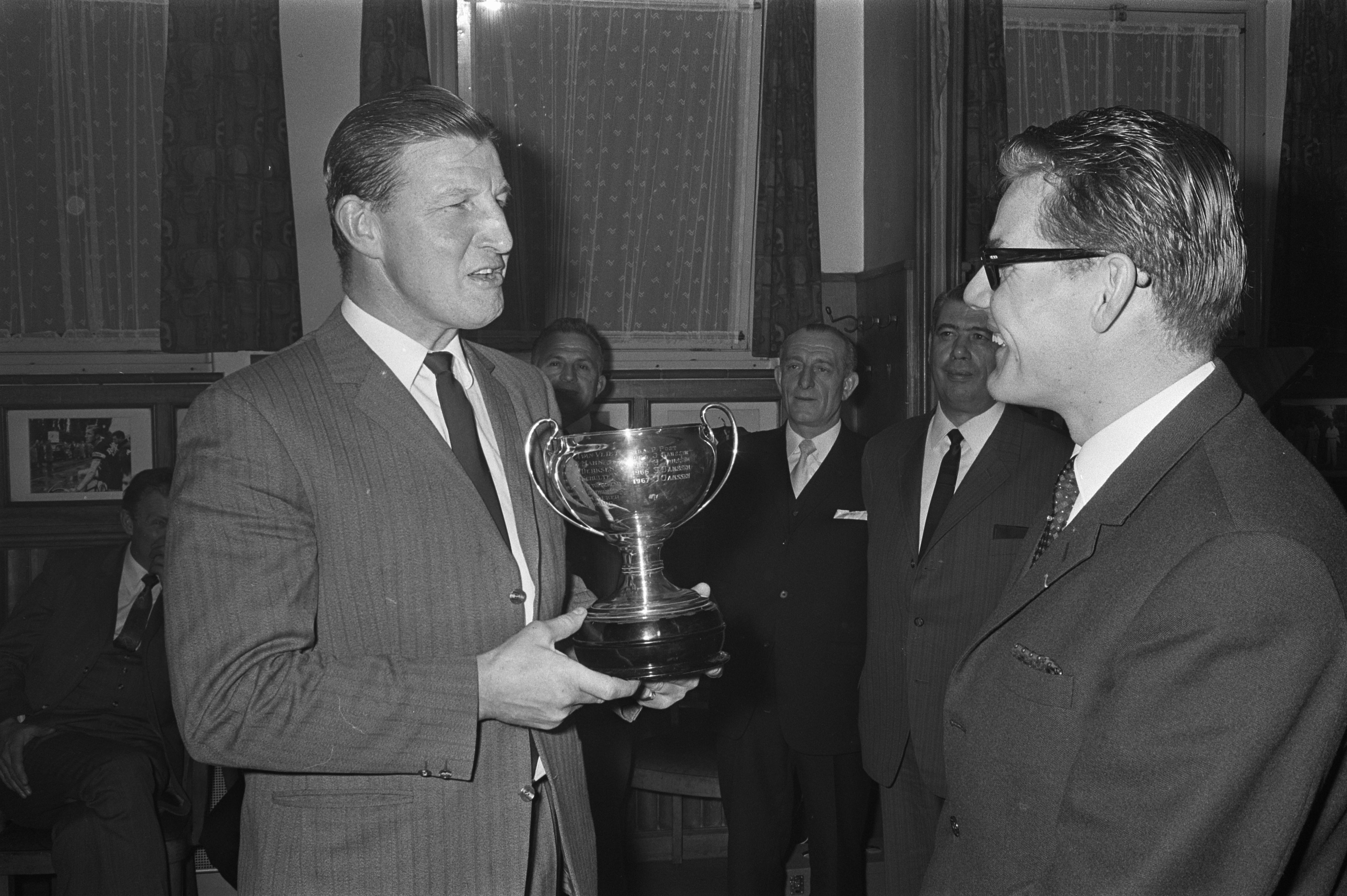 Collectie / Archief : Fotocollectie Anefo Reportage / Serie : [ onbekend ] Beschrijving : Jan Janssen en Fedor den Hertog beste renners van het jaar, Jan Janssen (rechts) ontvangt beker uit handen van Gerrit Schulte Datum : 19 januari 1968 Locatie : Den Bosch Trefwoorden : prijsuitreikingen, sport, wielrennen Persoonsnaam : Janssen, Jan, Schulte, Gerrit Fotograaf : Koch, Eric / Anefo Auteursrechthebbende : Nationaal Archief Materiaalsoort : Negatief (zwart/wit) Nummer archiefinventaris : bekijk toegang 2.24.01.05 Bestanddeelnummer : 921-0049